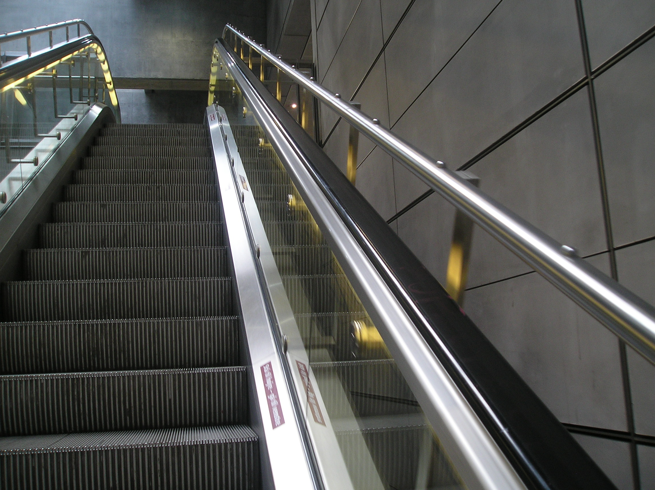 Nørreport Metro Station in Copenhagen.